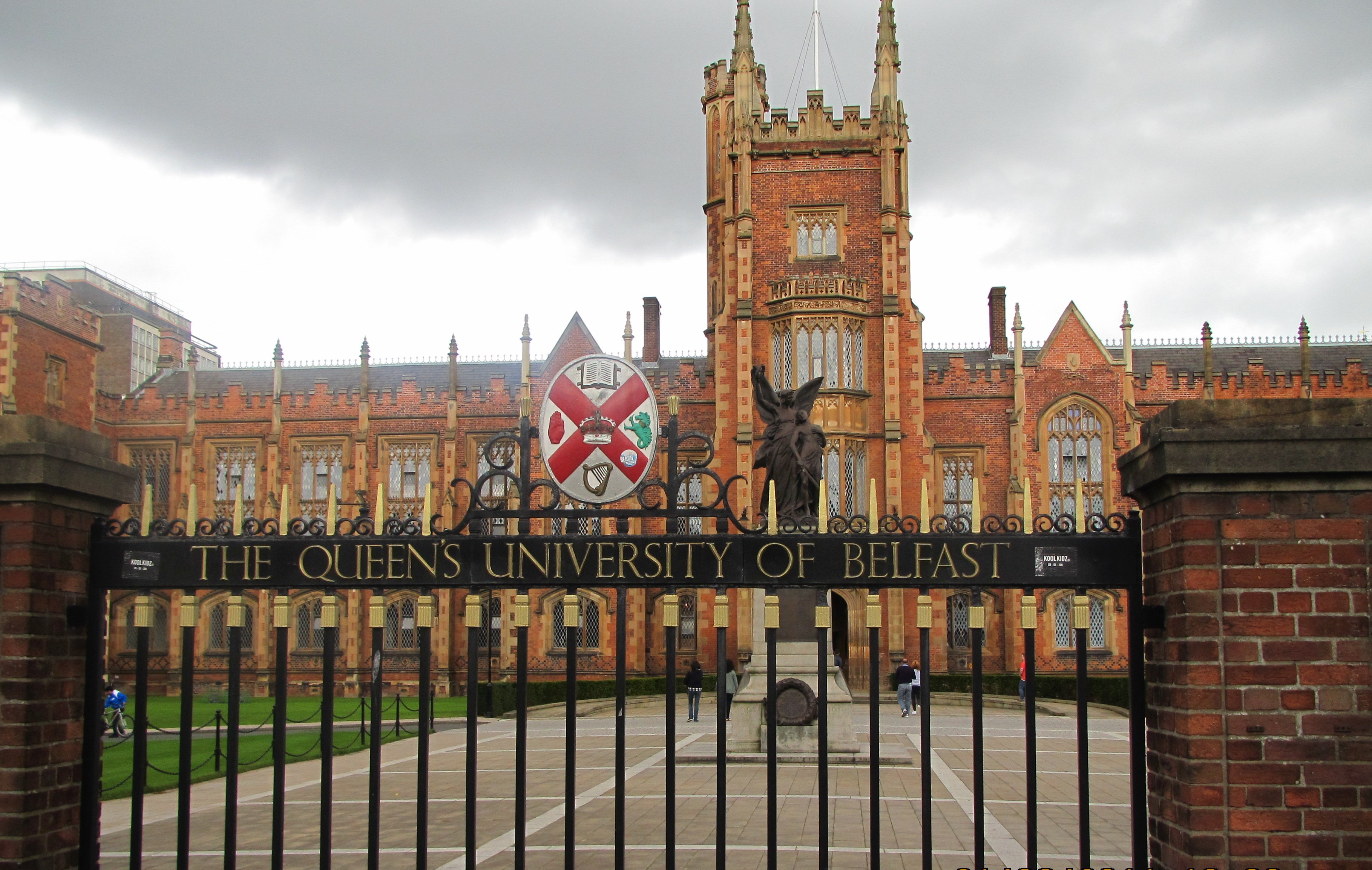 Queen's University Belfast by Paride